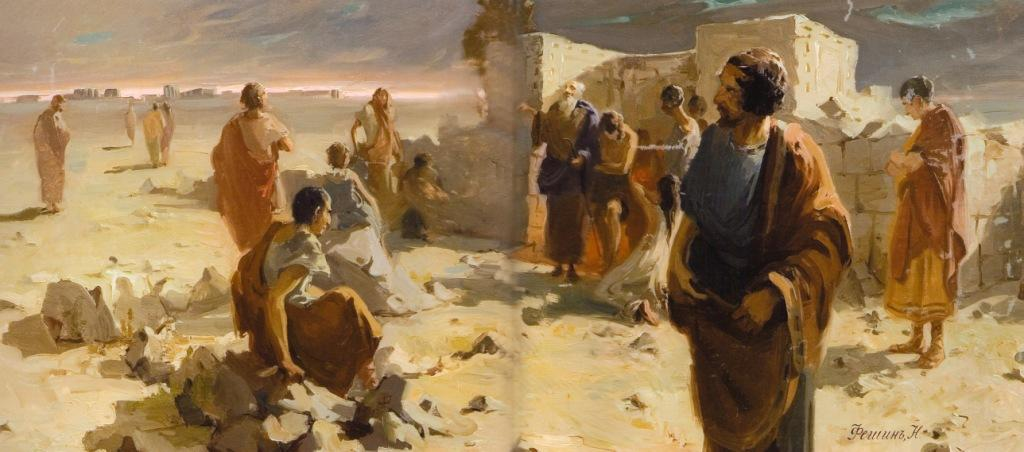 Одна из работ Н.И. Фешина, созданная в мастерской Репина